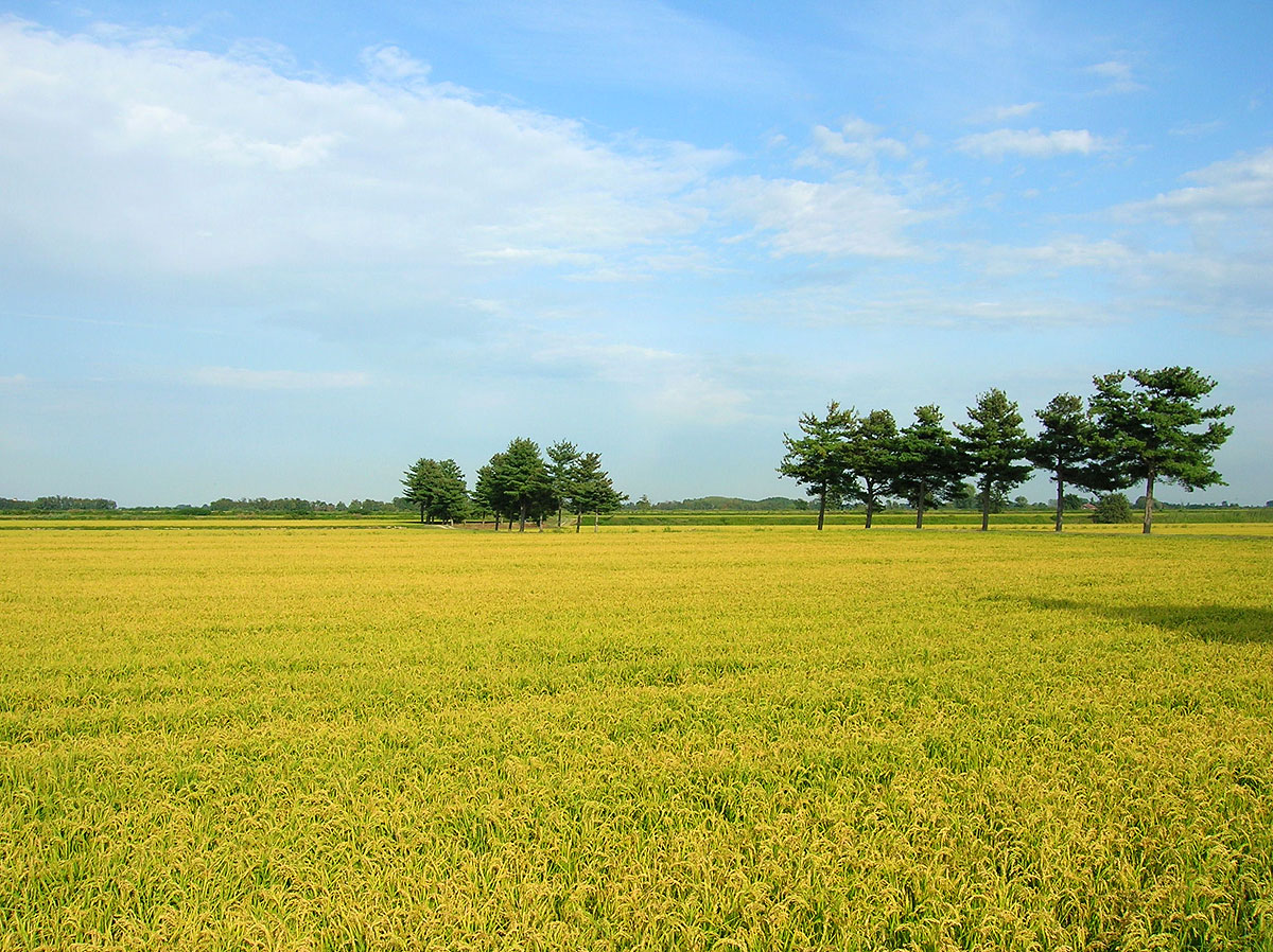 Risaie della pianura Novarese nei pressi di Vespolate (NO) foto by Alessandro Vecchi - 2005